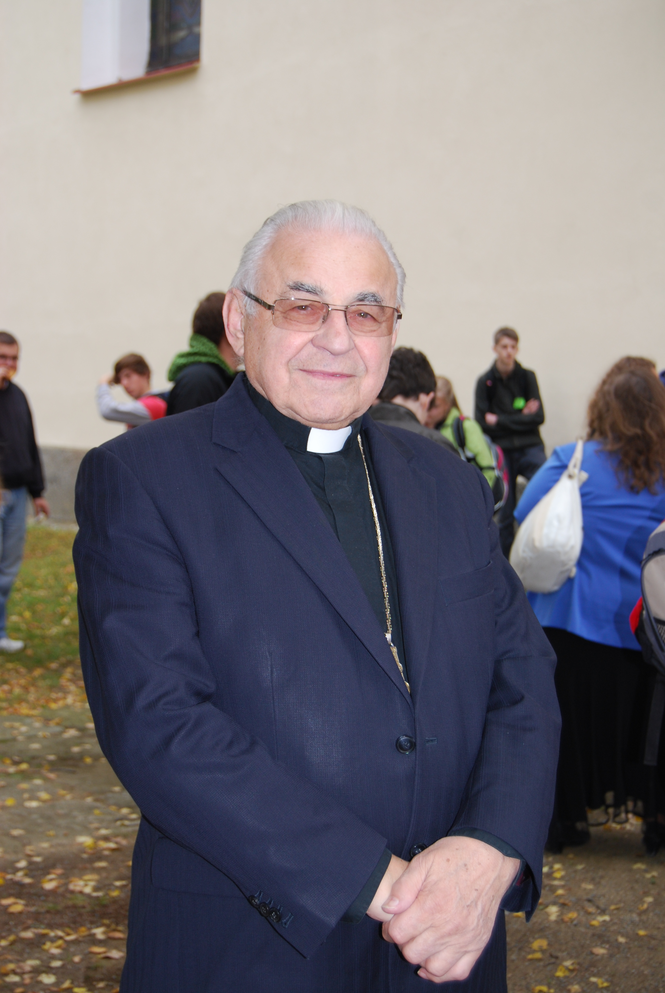 PhDr. Miloslav kardinál Vlk na Vikariátním setkání mládeže v Krásné Hoře nad Vltavou. Krásná Hora nad Vltavou. Okres Příbram. Česká republika.